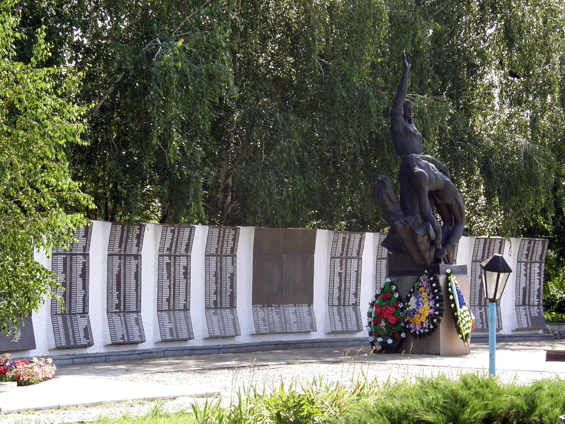 Пам’ятний знак воїнам-землякам., Барвінкове, пл. Центральна (Леніна)